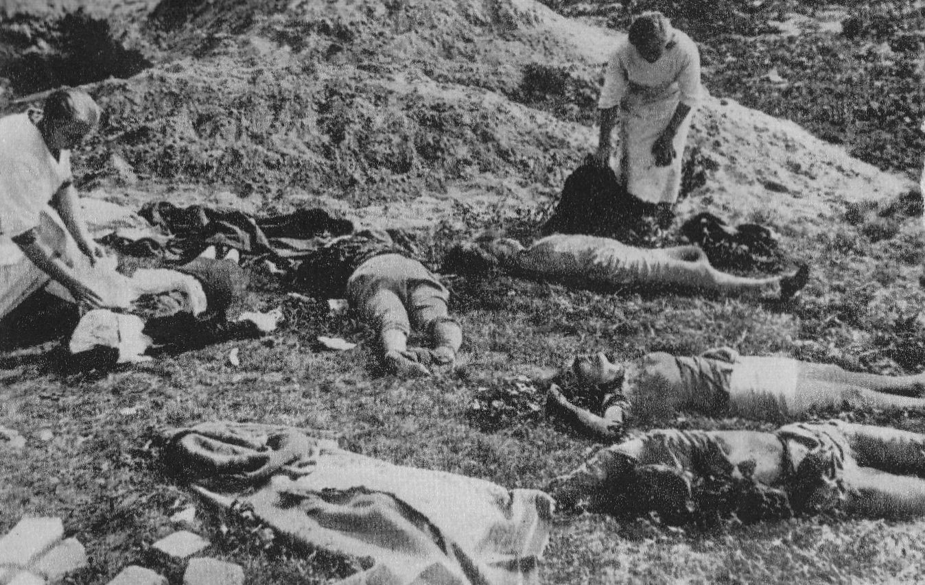 Ofiary nalotu na ulicy Ostroroga w Warszawie we wrześniu 1939